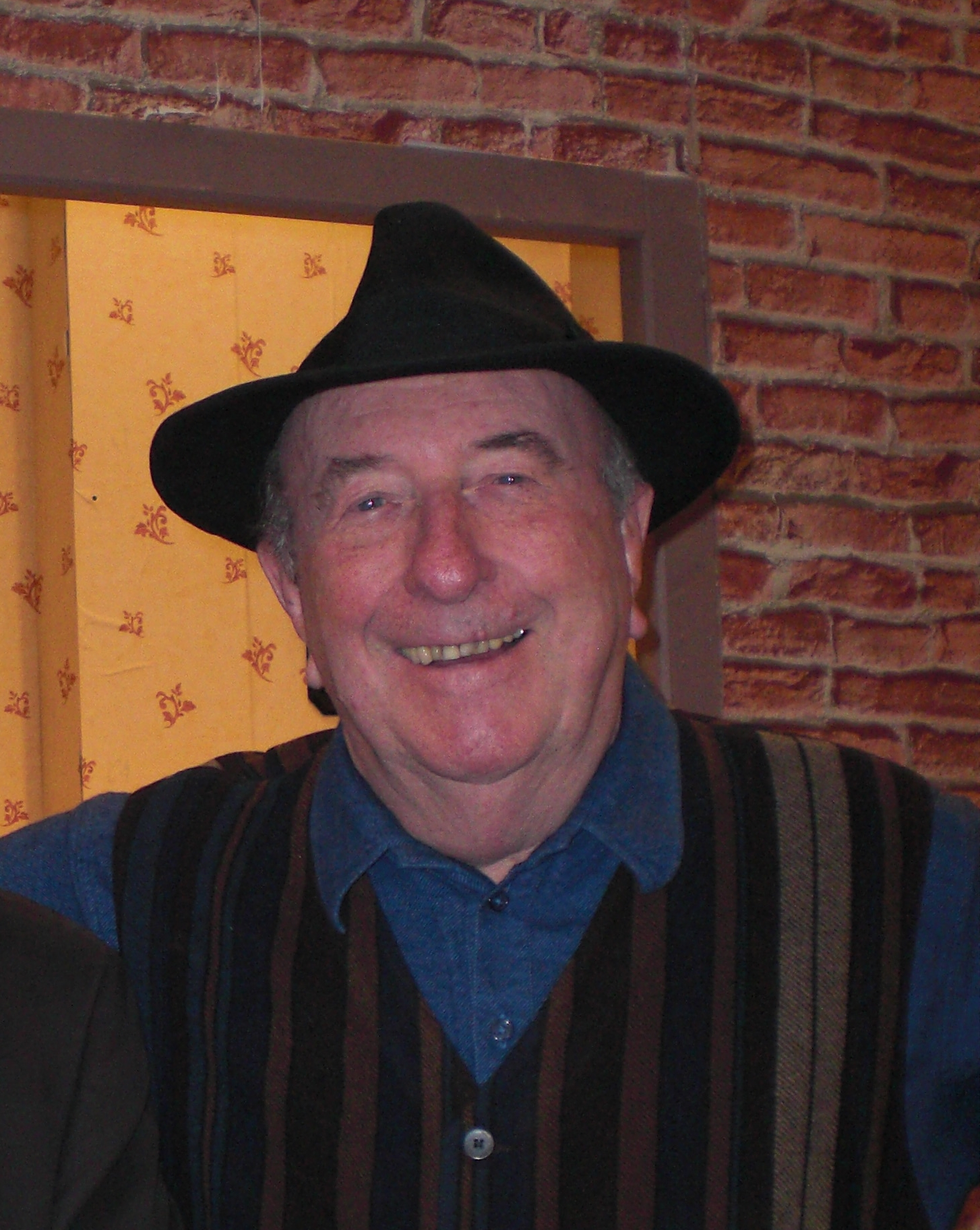 Lors du Fesch'tival à l'espace Pignon de Bully-les-mines